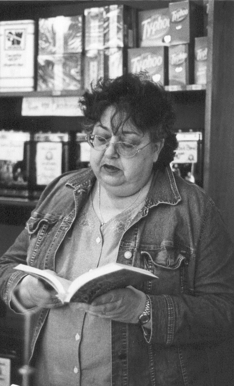 Copyright: Alexander Deriev, Sweden